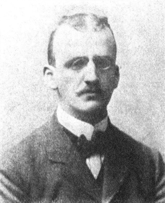 Österreichischer Politiker, Reichsratswahl 1907, Name siehe Dateiname